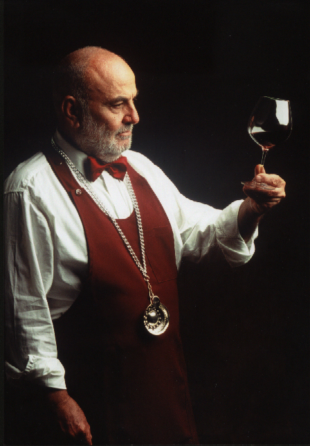 Sommelier F.I.S.A.R.